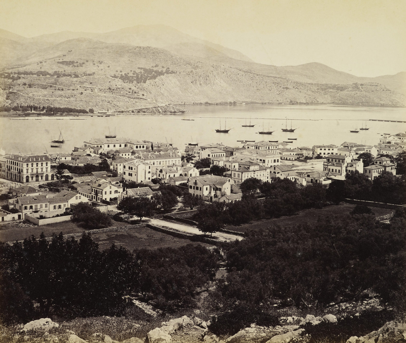 Argostoli?